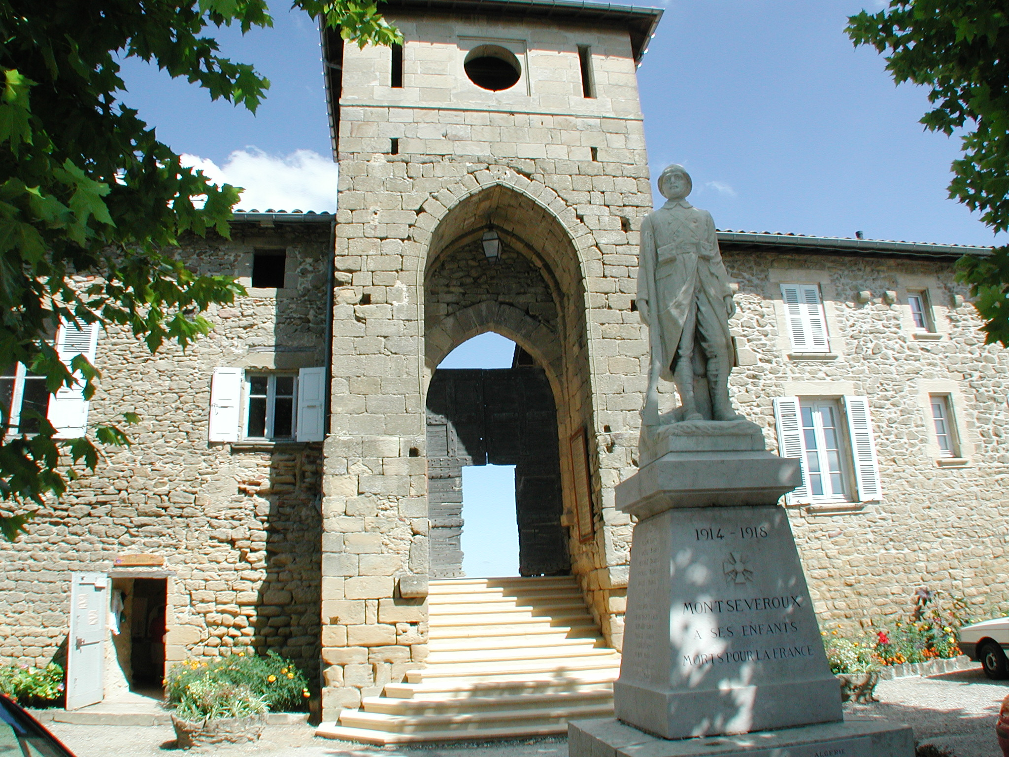 Château de Montseveroux, (Inscrit, 1976) .